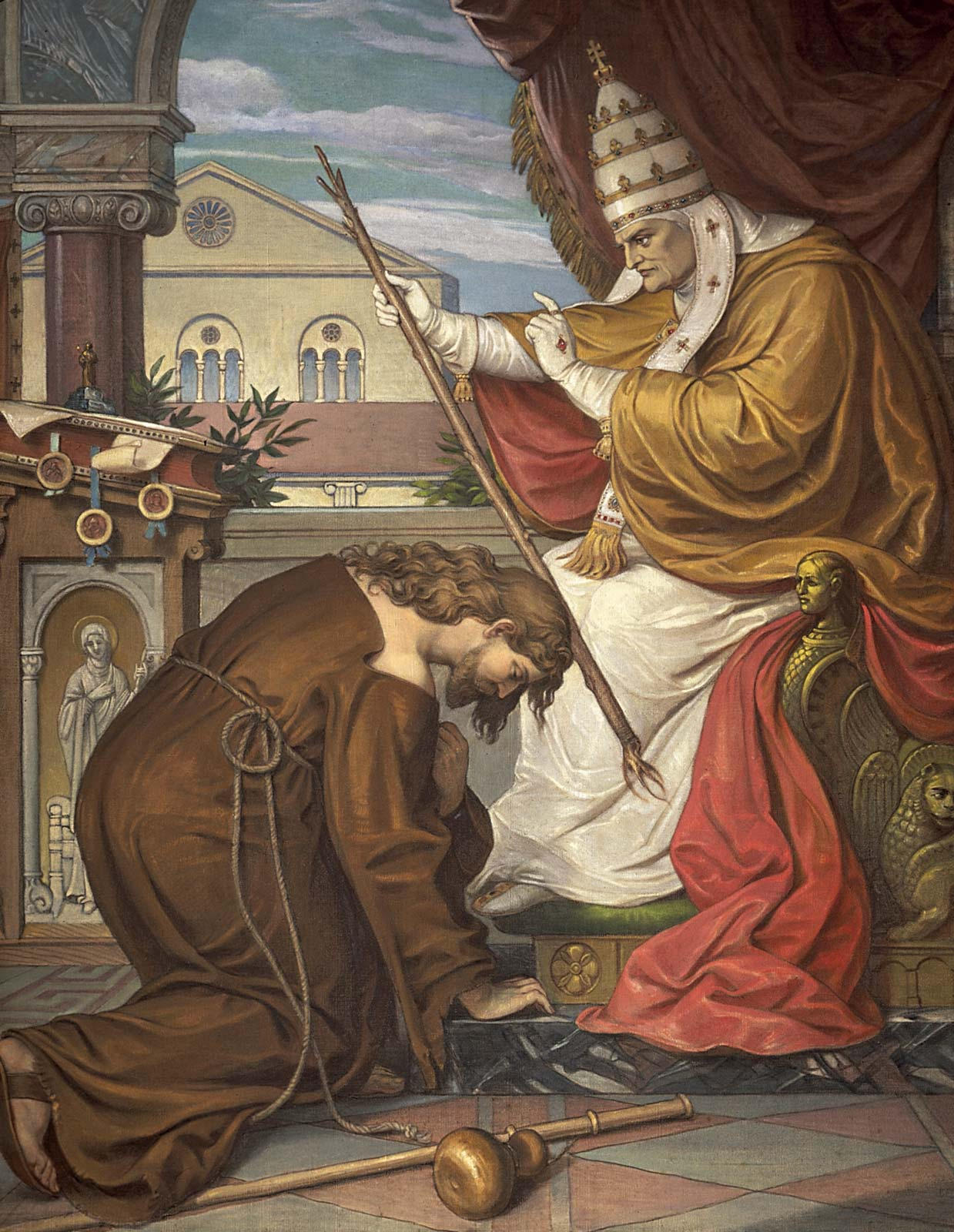 Tannhäuser of Ferdinand von Piloty